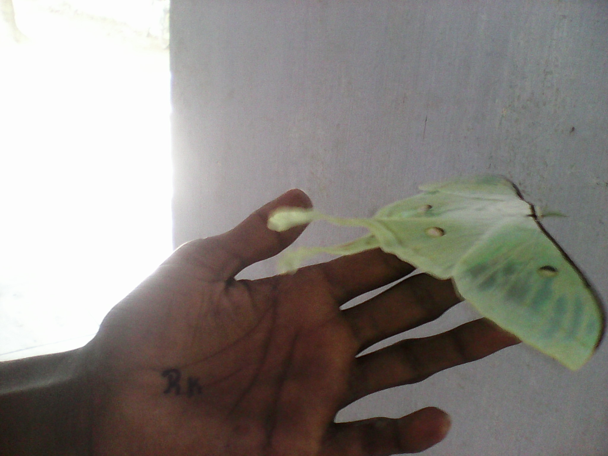 This beautiful luna moth was found in our school, Govt higher secondary school, Thirupputkuzhi, Kanchipuram district